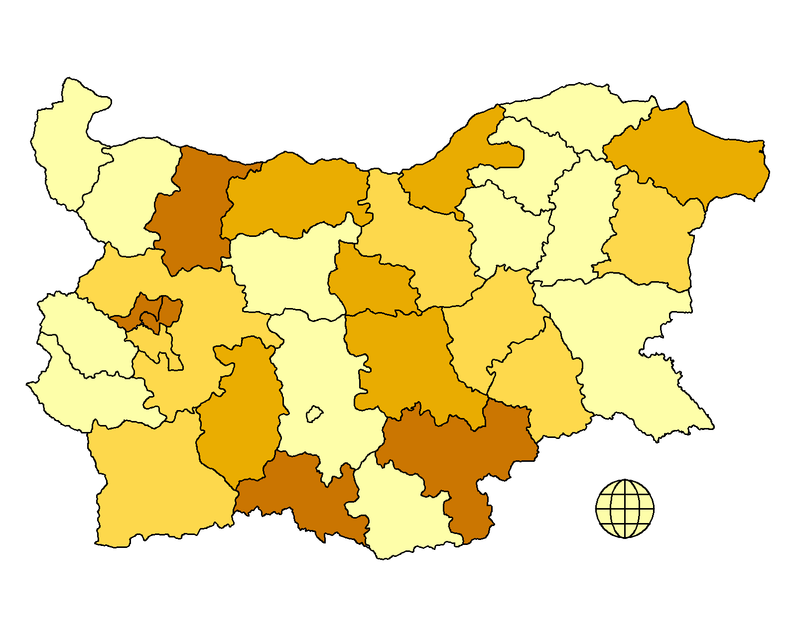 Гласуване по райони за Български народен съюз на парламентарните избори през 2005. Всеки от цветовете съответства на приблизително 1/4 от подадените гласове По тъмният цвят съответства на получен по-голям процент от гласовете